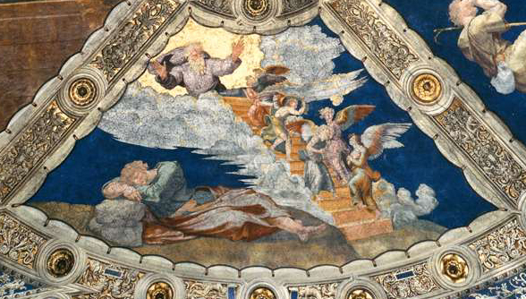 Ceiling Fresco Stanza di Eliodoro, Palazzi Pontifici, Vatican